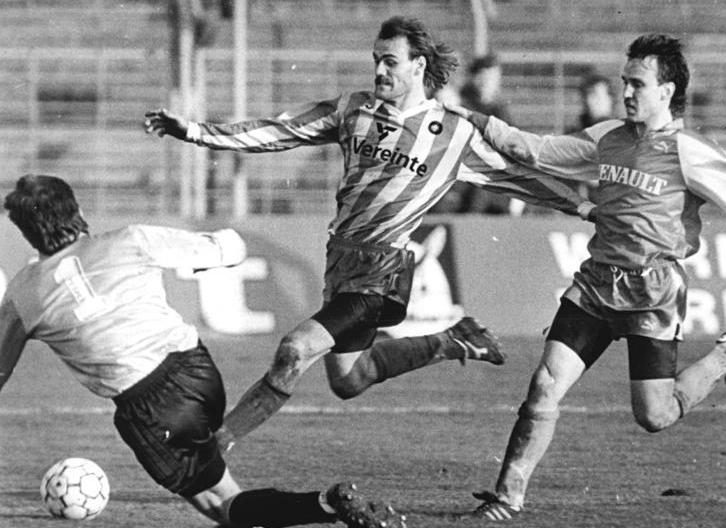 ADN- Wolfgang Kluge-10.11.90-Leipzig: Fußball-Oberliga Nordost- 1. FC Lok Leipzig - FC Energie Cottbus 3:1 (0:0) Stürmer Bernd Hobsch (M.) hat die Chance zum vierten Treffer für die Leipziger, jedoch Torwart Antonio Anaview von Energie Cottbus wehrt den Ball ab. Rechts der Cottbusser Abwehrspieler Mike Pohland. Information added by Wikimedia users.Korrekte Namen: Antonio Ananiew